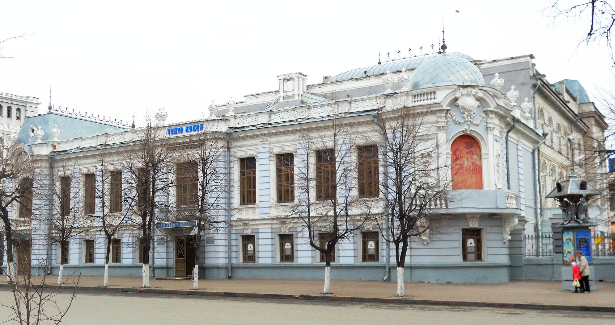 Здание кукольного театра в г. Ульяновске